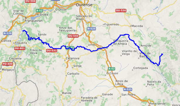 carte réalisée sur umap This map may be incomplete, and may contain errors. Don't rely solely on it for navigation.